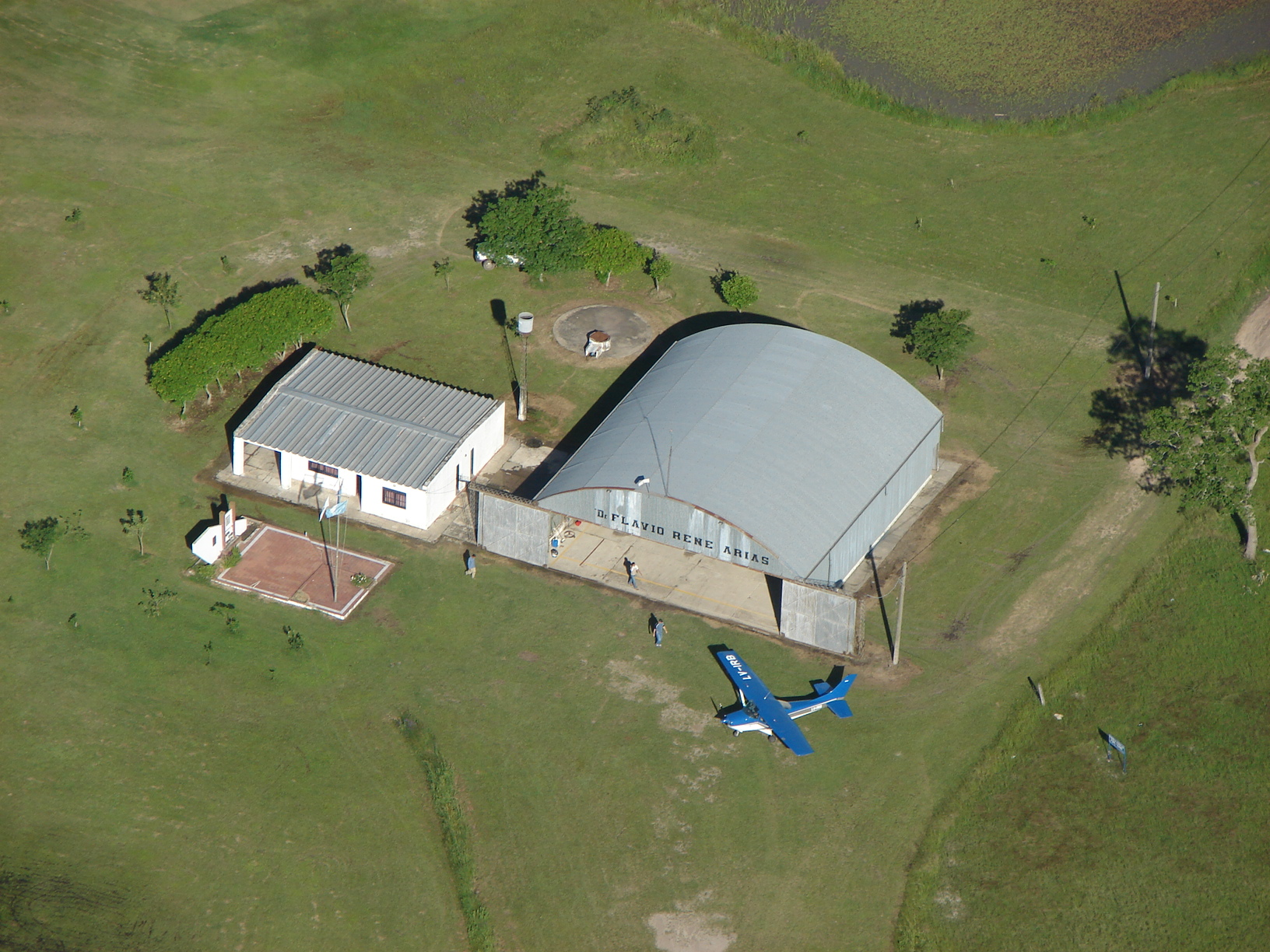 Imágen aérea de las instalaciones sociales, hangar y avión Cessna C182 LV-IRB